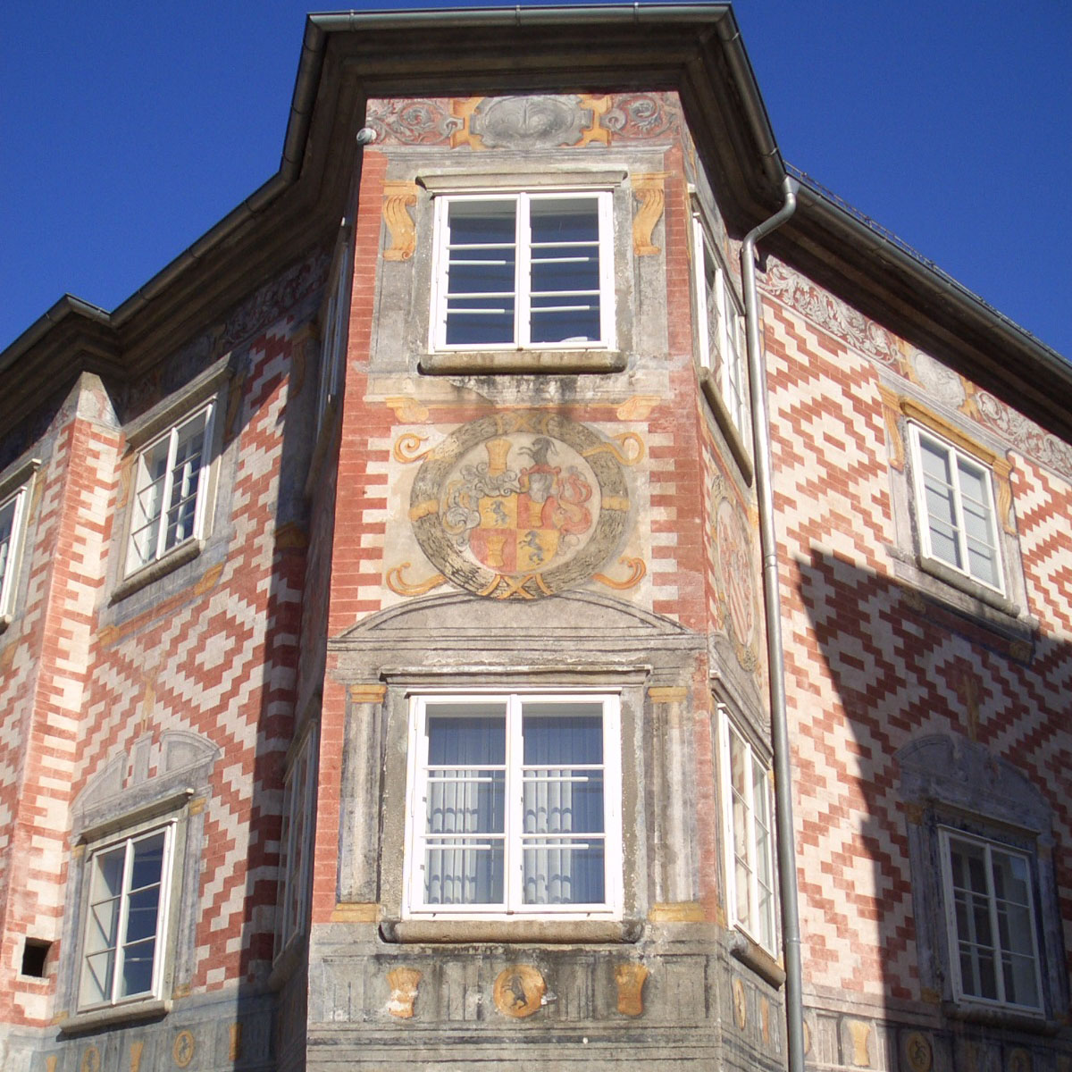 Haus der Salome Alt in Wels